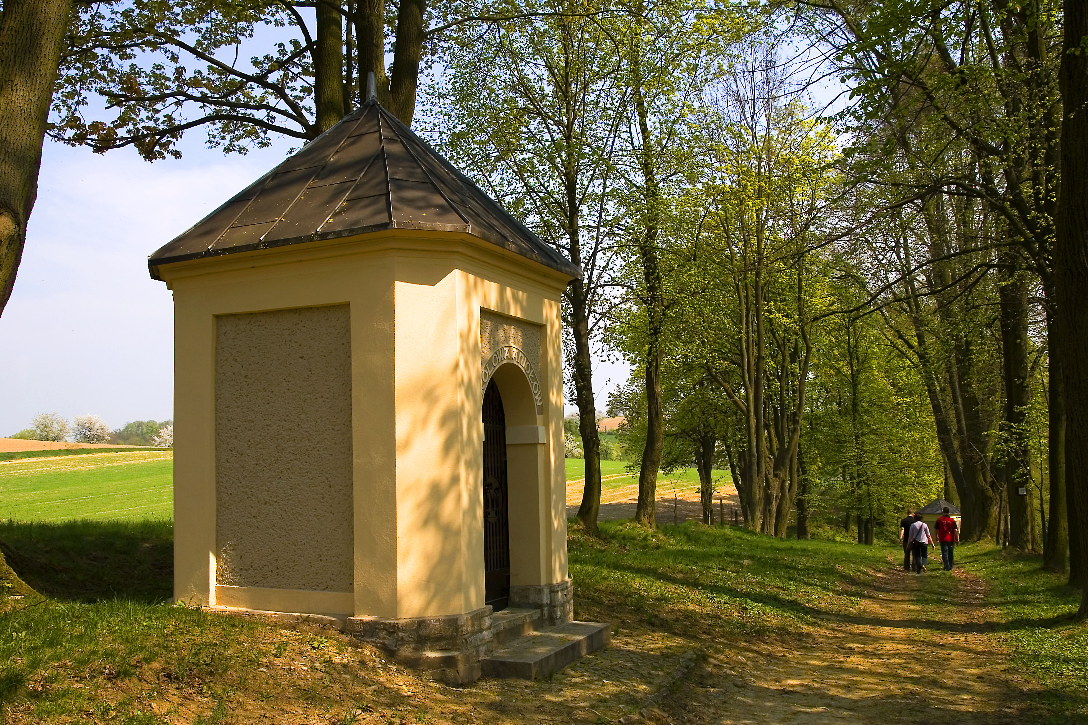 Góra św. Anny, kaplica Królowa Aniołów, Gmina Leśnica, powiat strzelecki